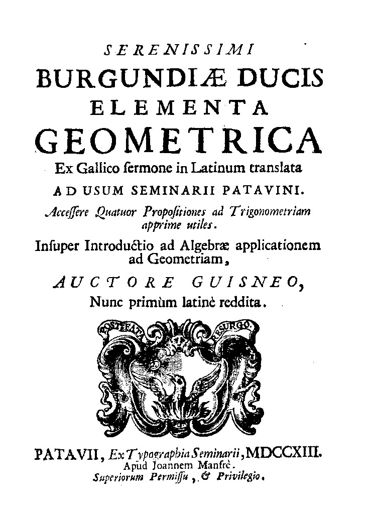 Serenissimi Burgundiae ducis Elementa geometrica ex Gallico sermone in Latinum translata ad usum Seminarii Patavini. Accessere quatuor propositiones ad trigonometriam apprime utiles. Insuper Introductio ad algebrae applicationem ad geometriam, auctore Guisneo, nunc primum Latine reddita. - Patavii : ex Typographia Seminarii apud Joannem Manfrè, 1713. - [20], 158, [2], 60 p., 20 c. di tav. ripiegate : ill. ; 4º. - L'opera ricavata dalle lezioni di matematica di Nicolas Malezieu. Contiene con proprio occhietto a carta a1r: Introductio ad algebrae applicationem ad geometriam .